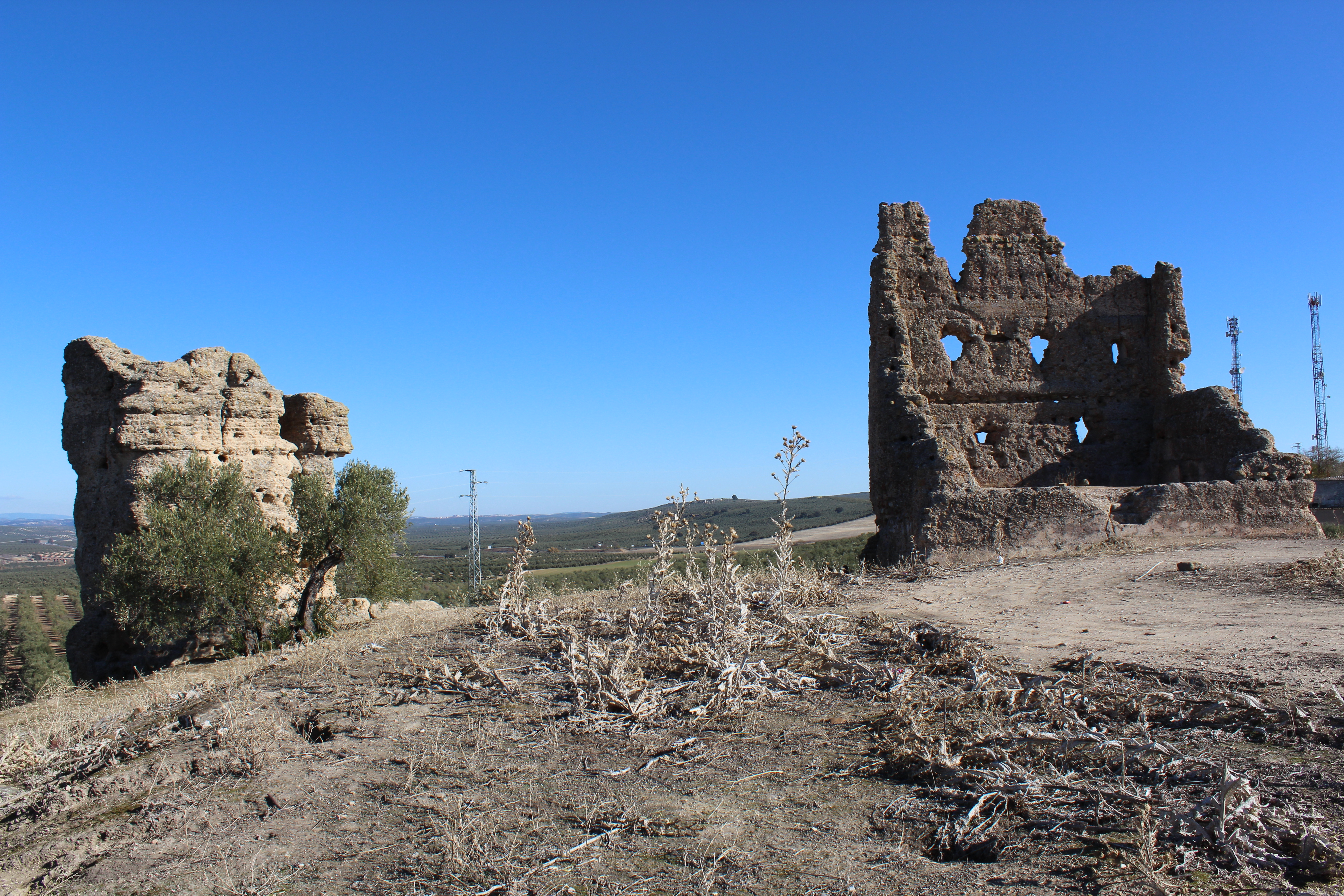 Vista general del Castillo de las Huelgas.